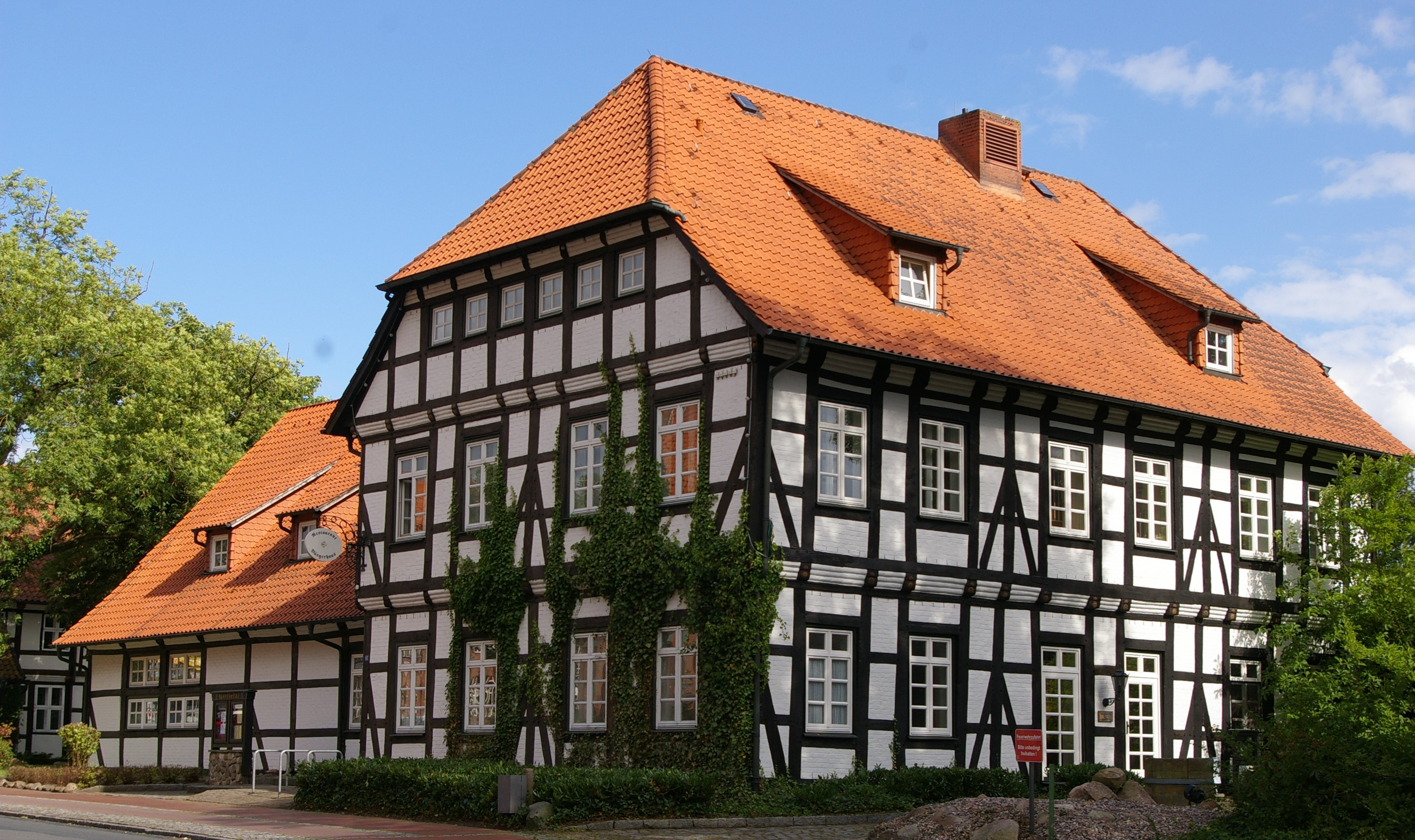 Das jetzige Bürgerhaus